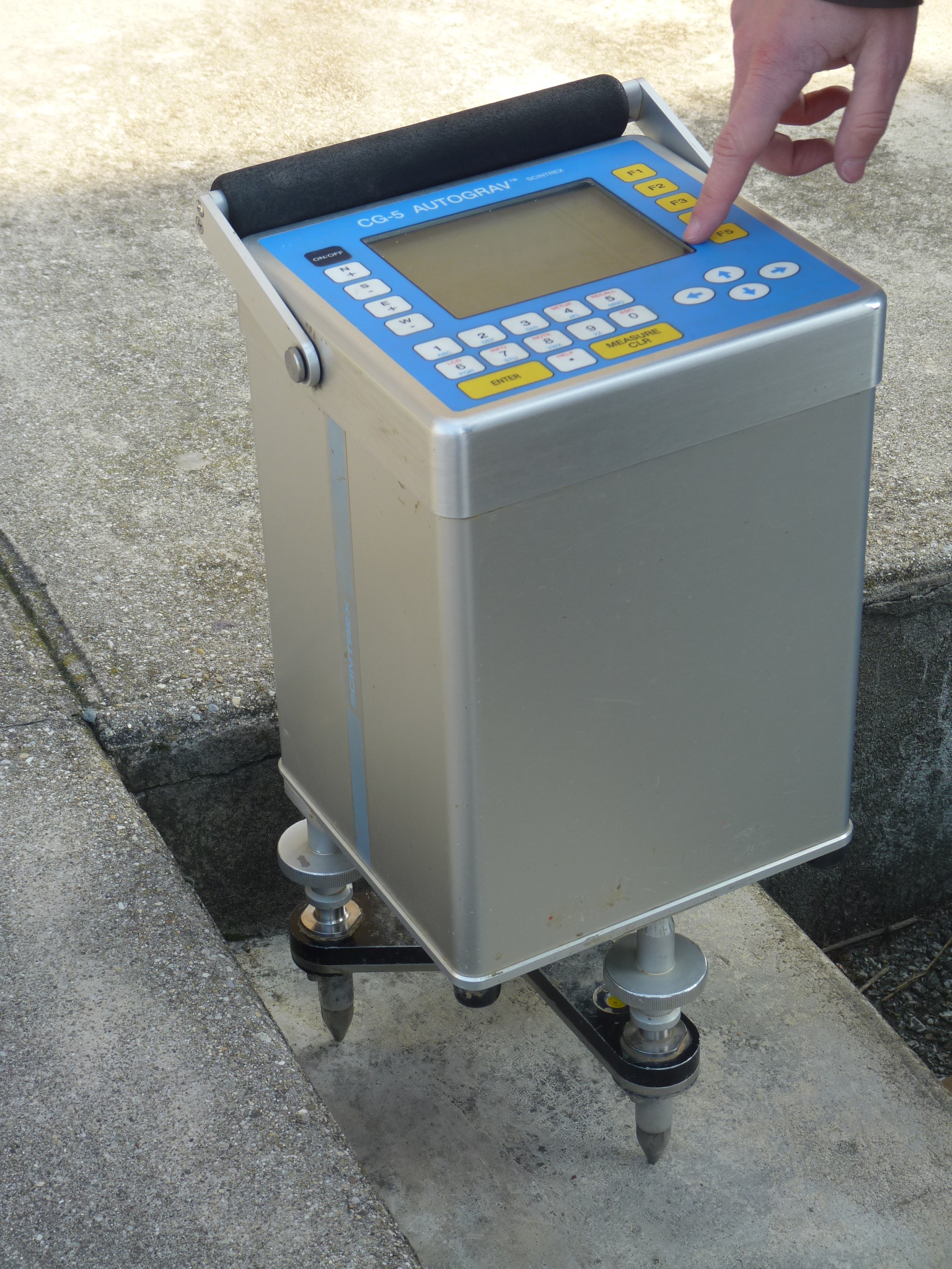 Burris gravimeter